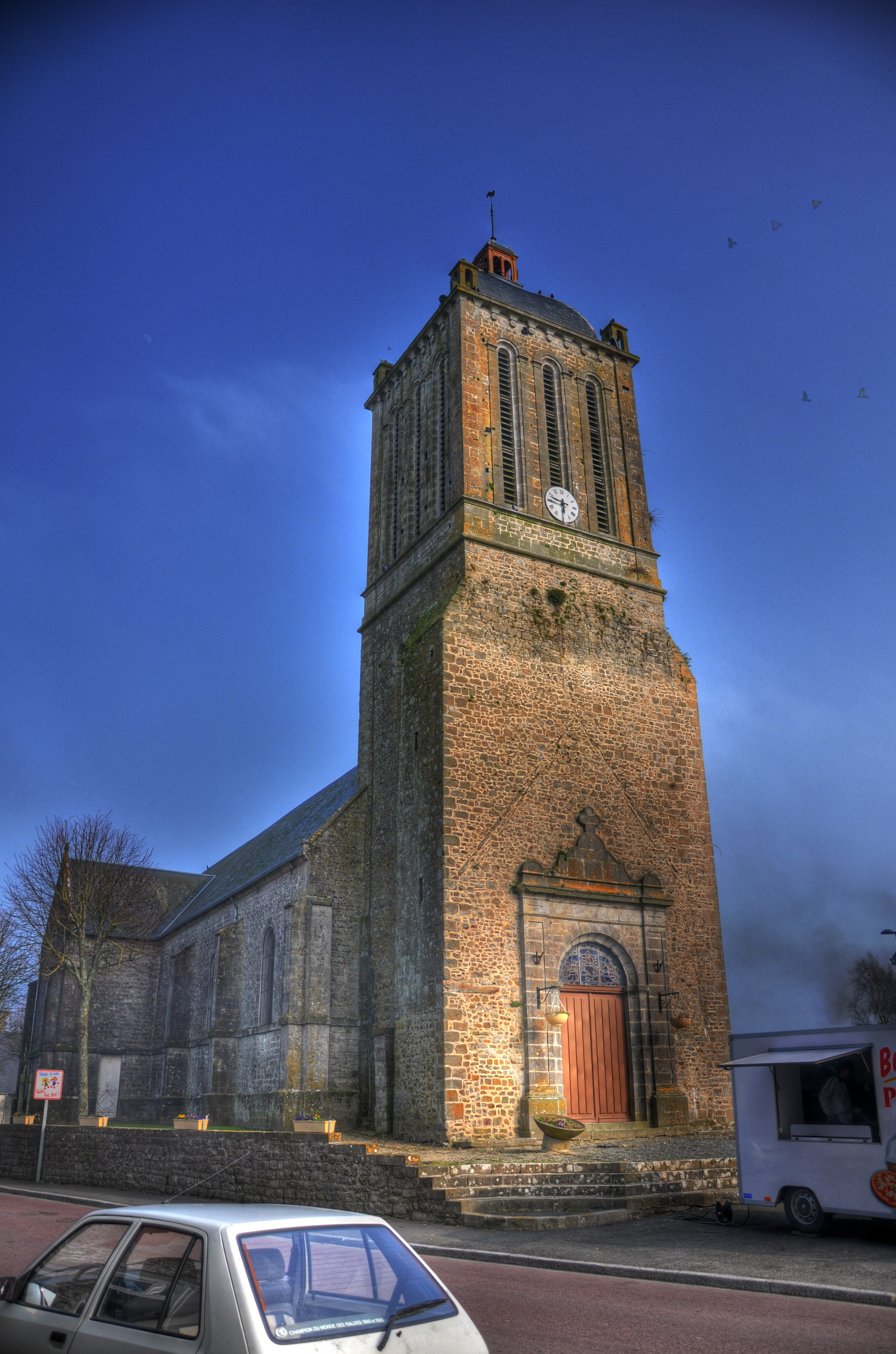 Photo HDR de l'église de Montmartin-sur-mer